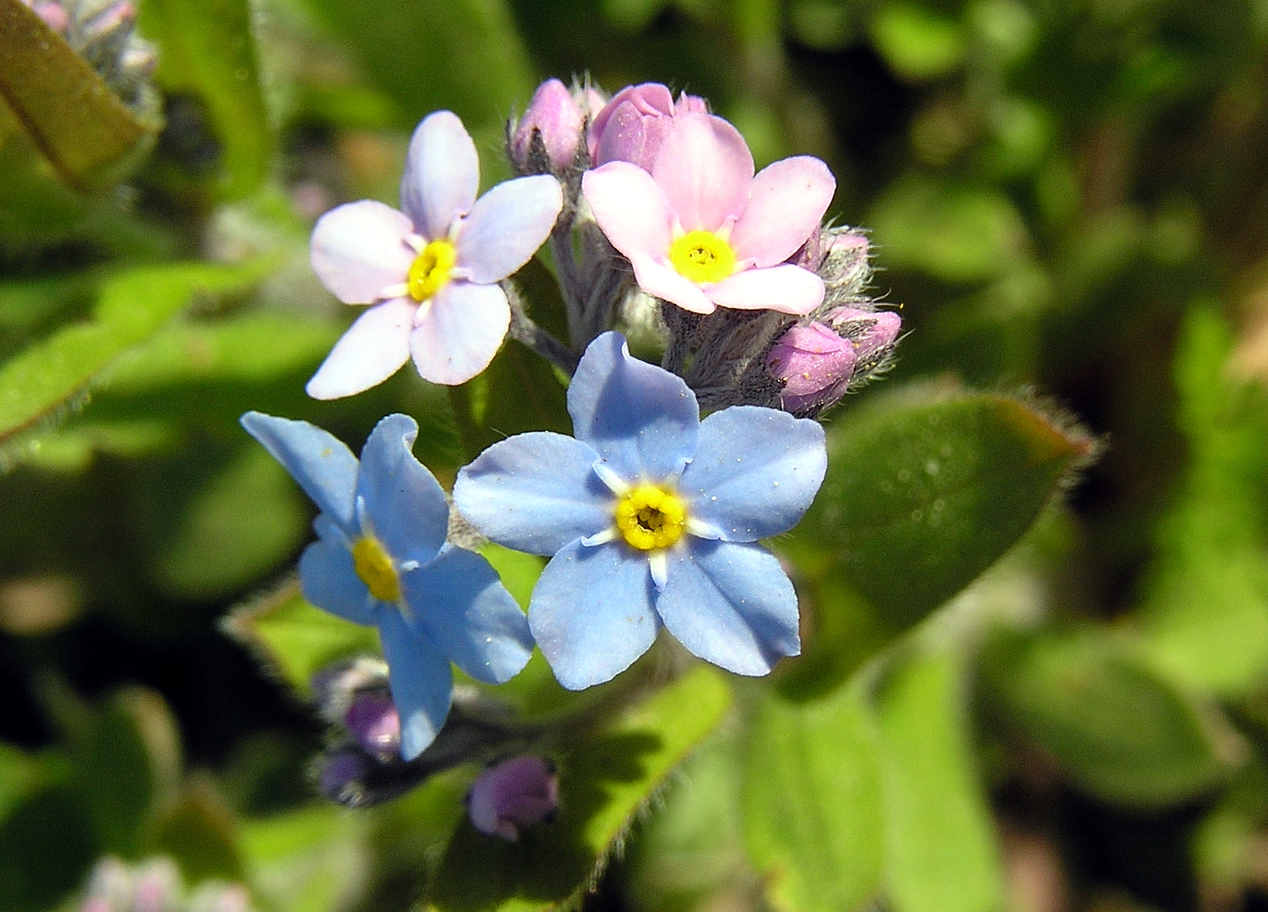 Põld lõosilma õis.